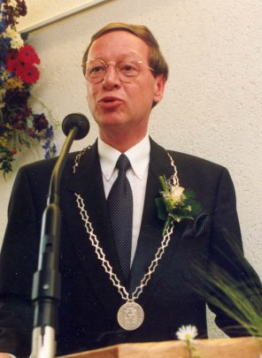 Burgemeester Tees van Westerschouwen. Intrede van de laatste burgemeester van de gemeente Westerschouwen, H.Tees (1991-1996). Tees houdt zijn inaugurele toespraak.